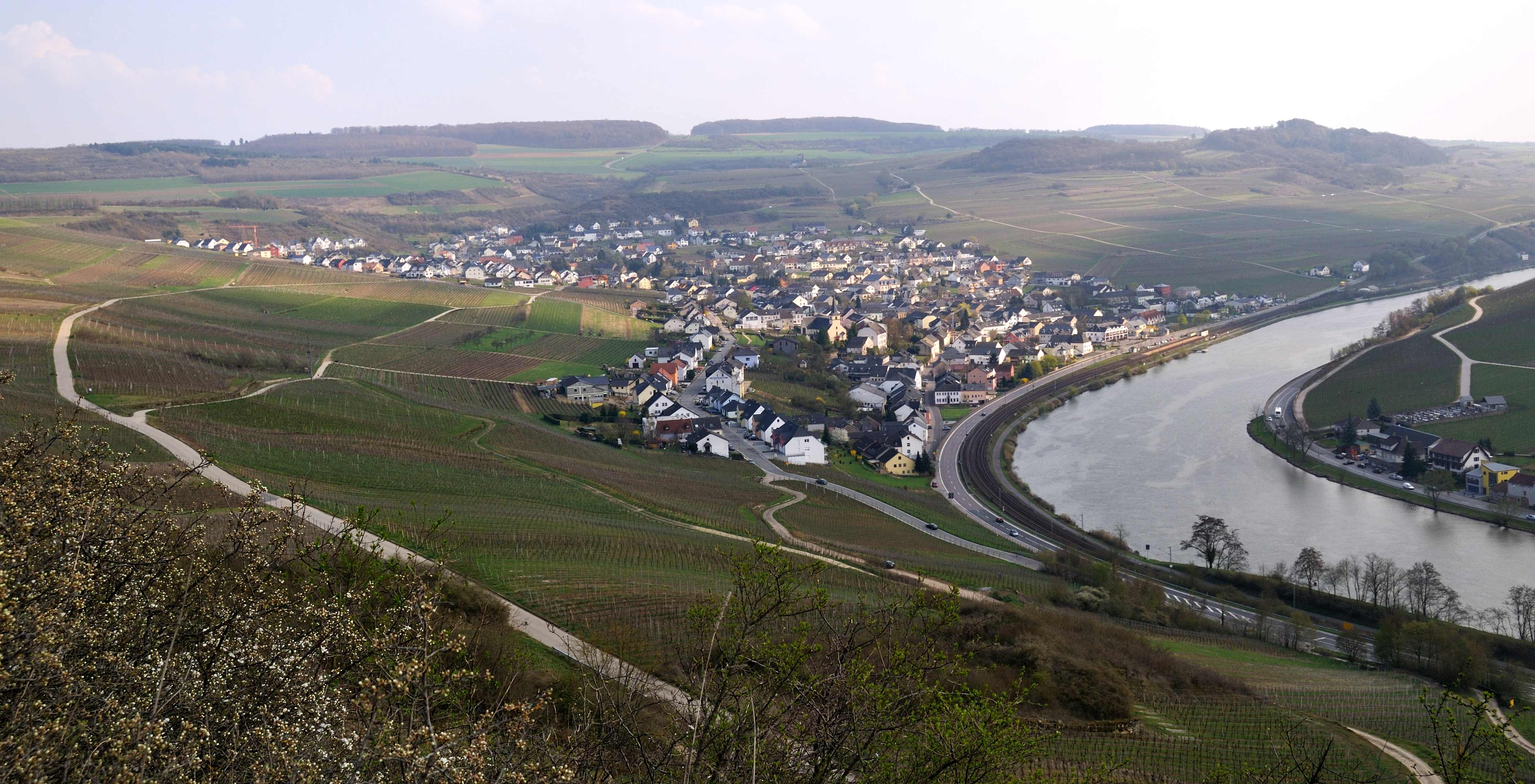 Nëttel vum Nëtteler Fiels aus gesinn